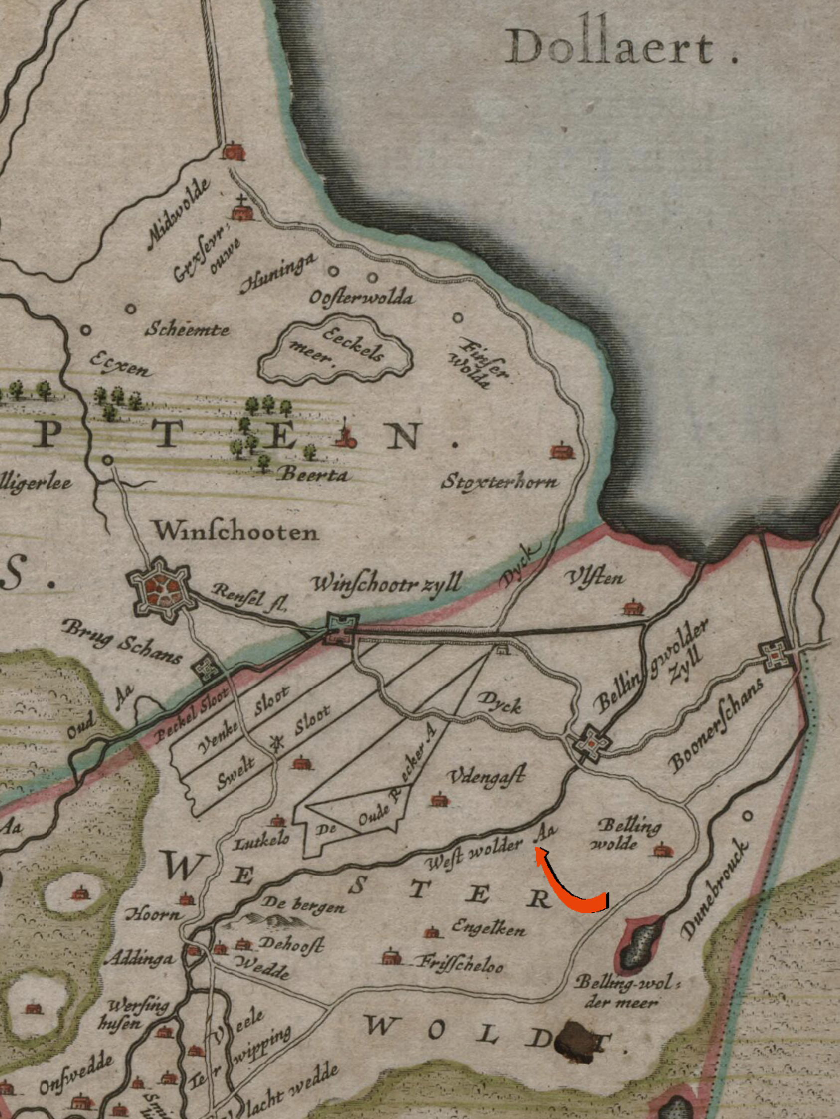 Detail van een oude kaart van Drenthe en Westerwolde uit 1634